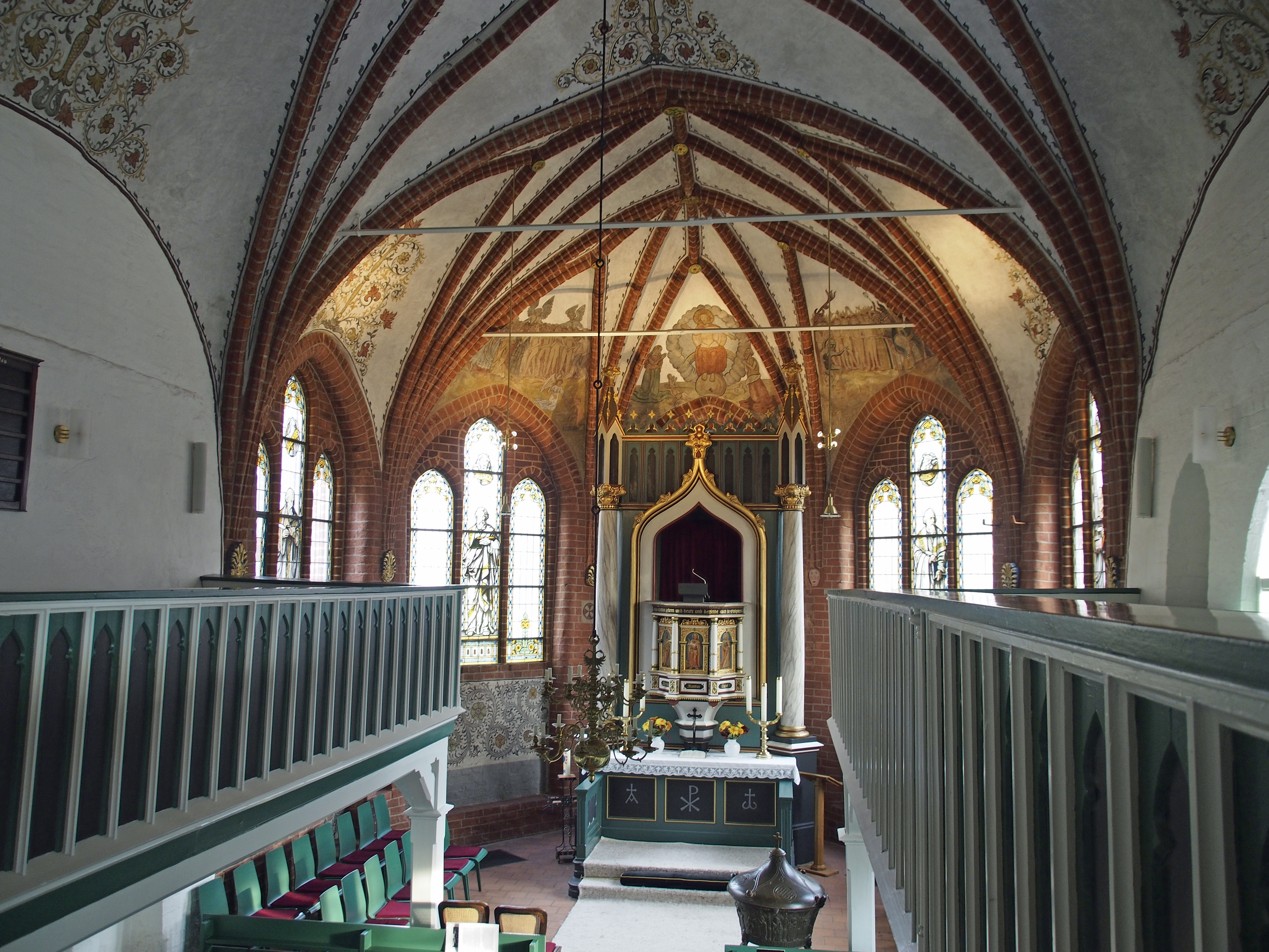 Müden (Örtze), Innenraum der St. Laurentius-Kirche